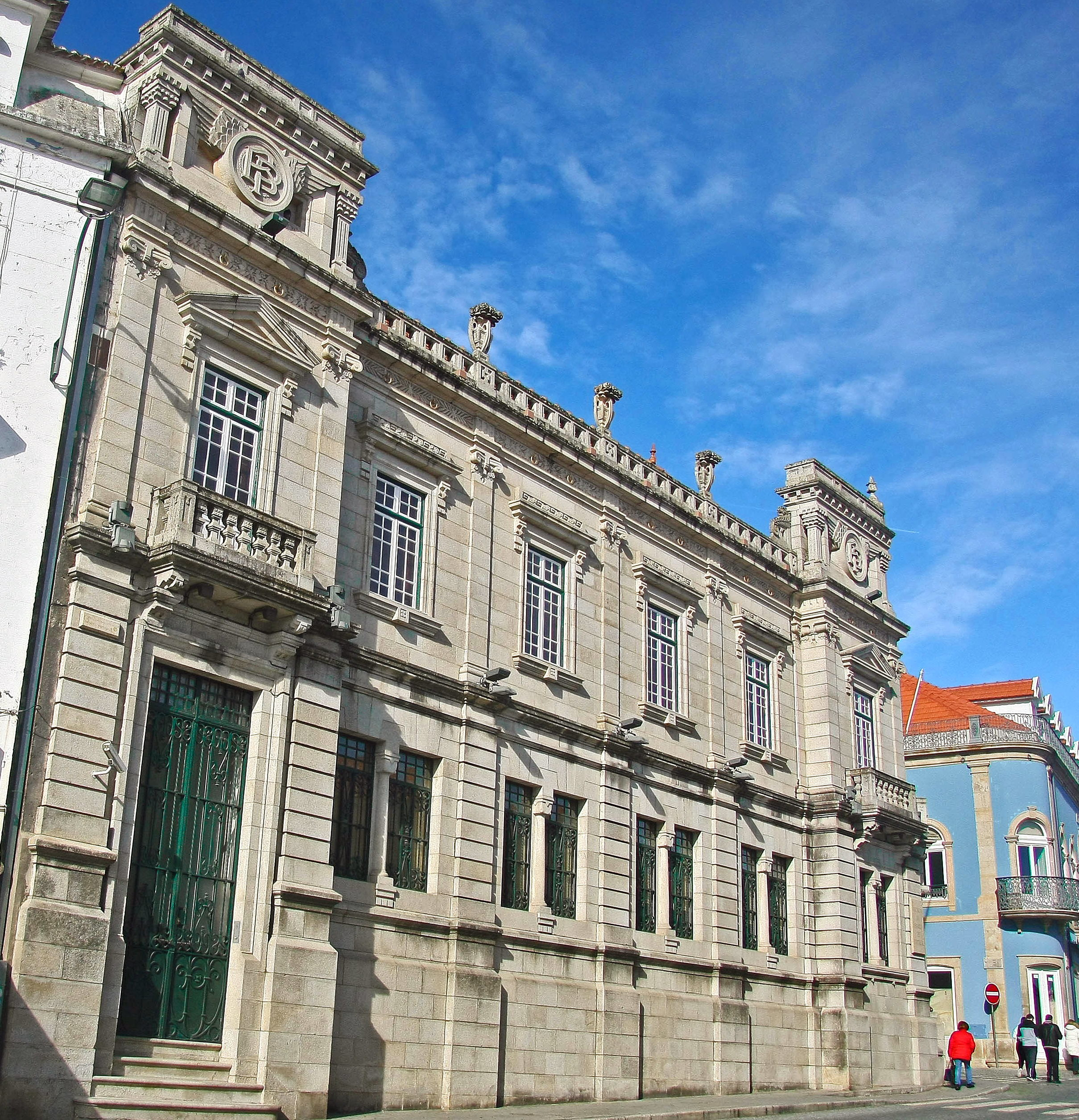 Inicialmente, a Agência, após obras de adaptação, ficou instalada no rés-do-chão do edifício do Governo Civil, onde anteriormente funcionara o Comissariado da Polícia, juntamente com a Repartição da Fazenda e outras dependências do Estado. Mas logo em 1893, o Governador Civil solicitava uma das casas atribuídas à Agência para alojar a Junta Geral. Esta situação manteve-se até 1913, ano em que devido às consecutivas insistências do Governador, o Banco decidiu alugar uma casa na Rua Alfredo Keil onde, após as necessárias adaptações, a Agência começou a funcionar a partir de 31 de Março. Só em 1918 surgia a oportunidade de adquirir, no melhor local da cidade, um edifício em ruínas e dois terrenos anexos, situados na Rua das Flores e Rua do Pina, edifício este posteriormente demolido para construção do novo edifício da Agência. O autor do projeto foi o arquiteto Eurico de Salles Viana, iniciando-se as obras em 11 de Dezembro de 1922 mas só em 27 de Julho de 1930 foram instalados e abertos ao público os serviços da Agência no novo edifício. Este apresenta a sua parte principal na zona do cruzamento de ruas, com um volume de planta octogonal desenvolvendo-se de igual forma para um e outro lado, com colunelos e pilastras a dividir o espaço entre janelas. Na parte central, as janelas apresentam sacadas salientes. O edifício é todo percorrido por entablamento e apresentando frontões de remate nas extremidades e na parte central. São em pedra a totalidade da fachada e também a sua ornamentação. Ao longo dos anos as instalações foram sendo objeto de várias intervenções, destacando-se, pela sua importância, obras de remodelação e de ampliação do edifício, pela aquisição de um prédio anexo à Agência, com um projeto da autoria do Arquiteto Correia Guedes. As obras iniciaram-se em Julho de 1999 e terminaram um ano depois tendo os serviços da Agência funcionado provisoriamente na Av. Humberto Delgado 22, também na zona central da cidade.